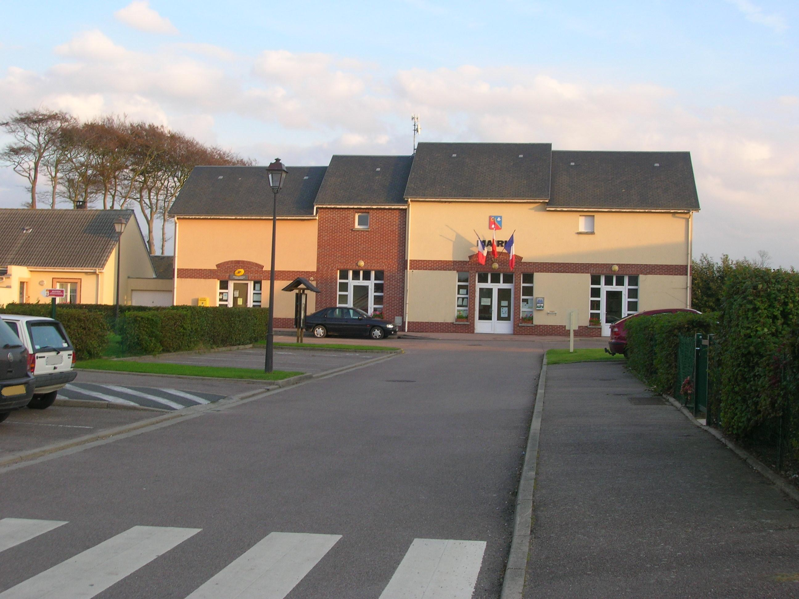 Mairie d'Eletot en Seine-Maritime